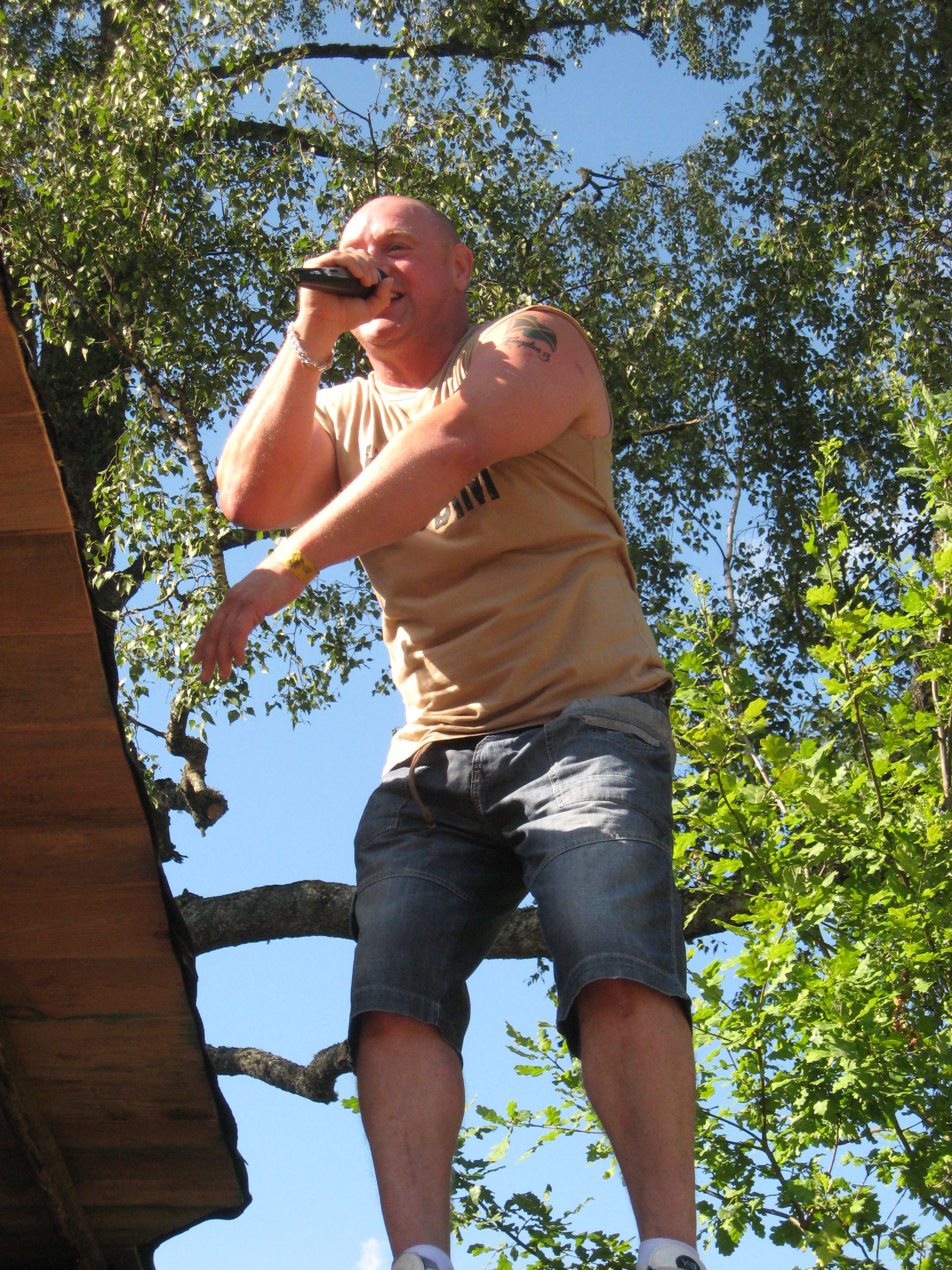 Jamie Irie toasting at Zvērā Festival 2010